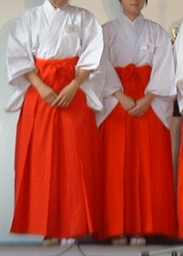 投稿者が2005年11月23日に撮影した画像をトリミングして作成。